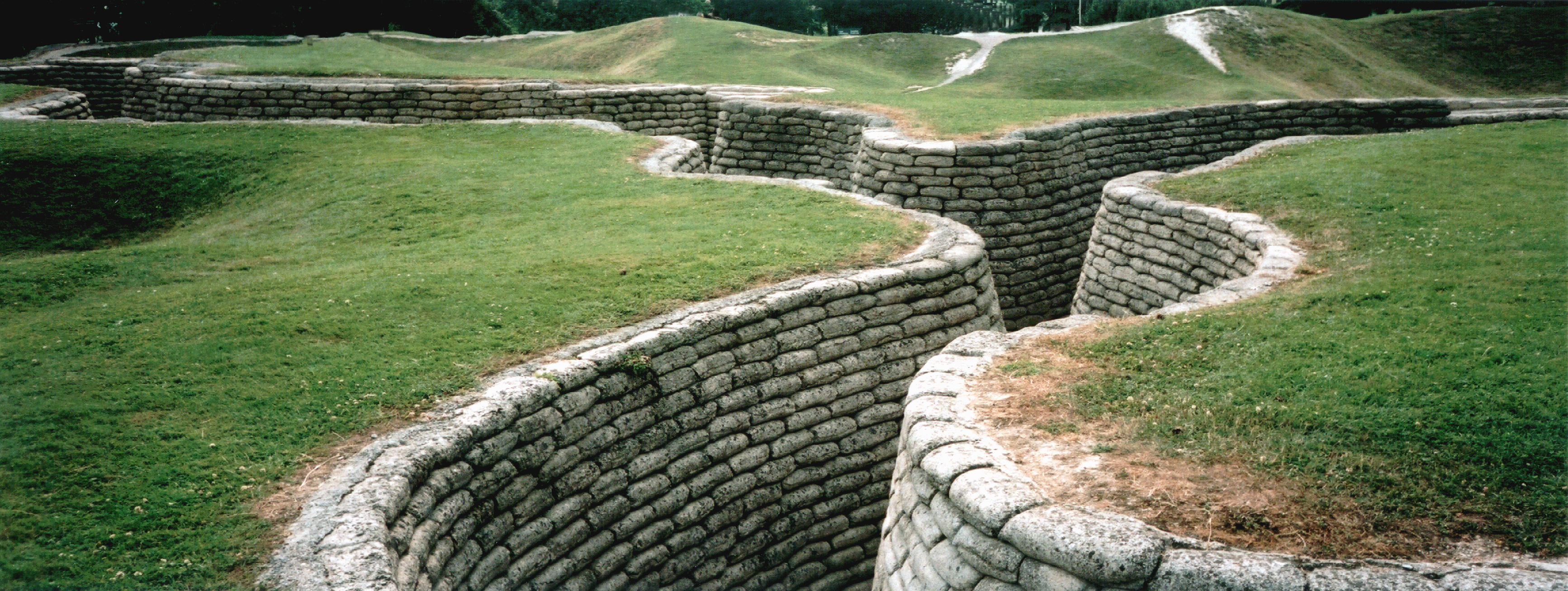 fr: Les tranchées de Vimy en: Trenches at Vimy